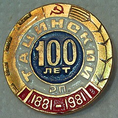 значок к 100-летию станицы тацинской